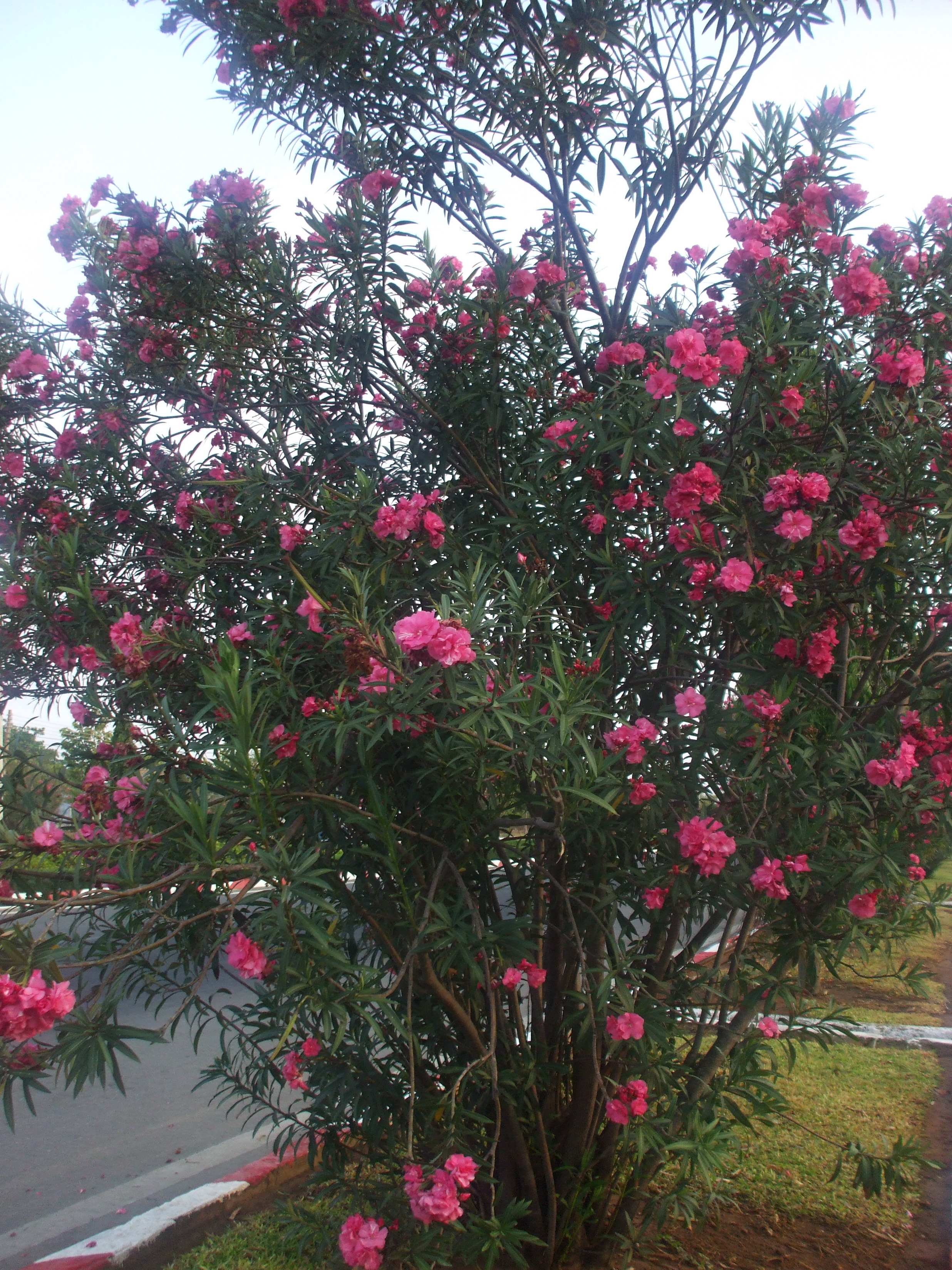 Một bụi cây trúc đào tại thành phố Long Xuyên (An Giang, Việt Nam)